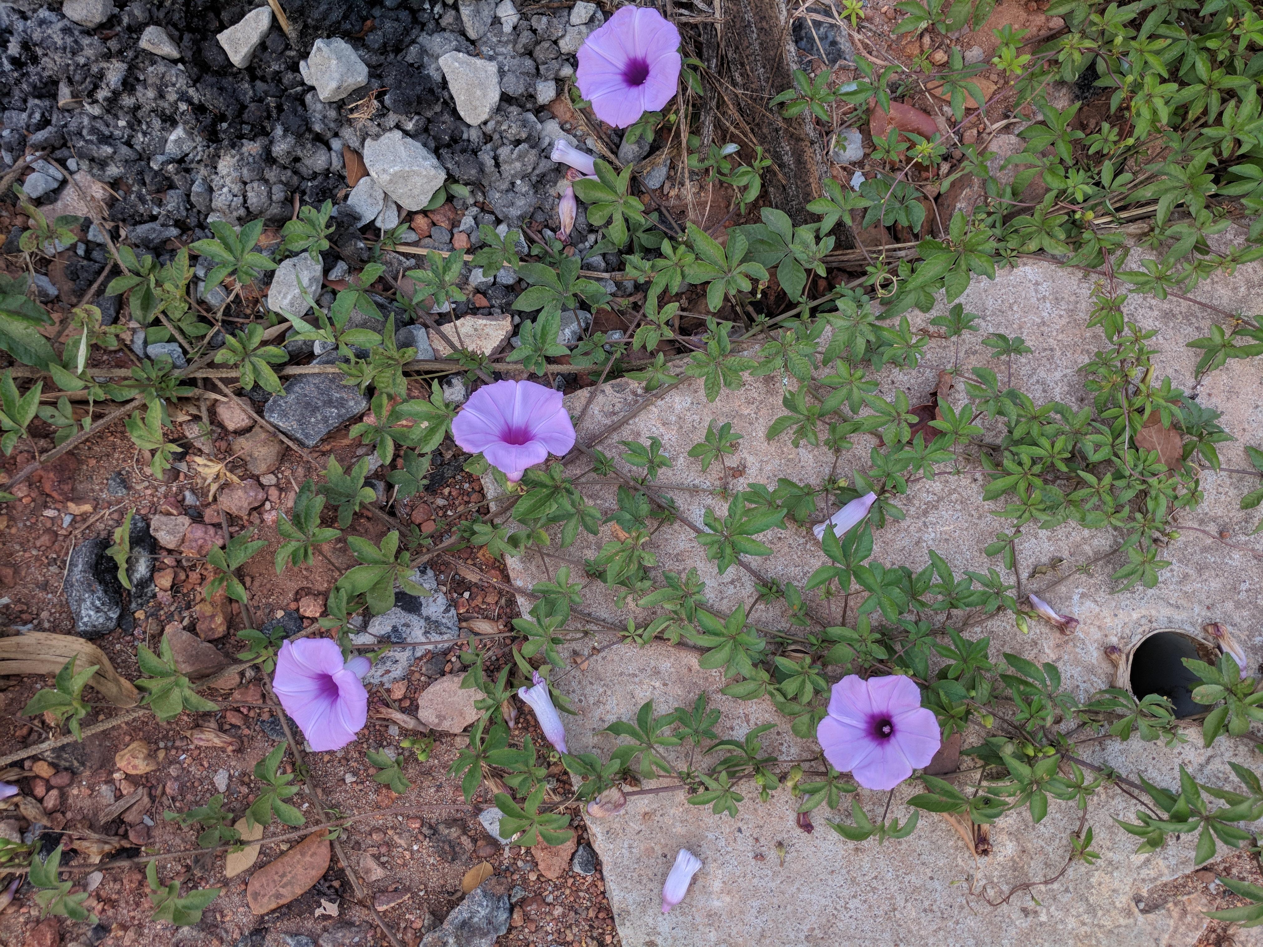 calicut